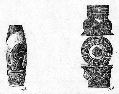 Osman Hamdi Bey. Le tombeau de Tabnit. Cylindre en onyx et Bracelet or et émail (fosse 3).